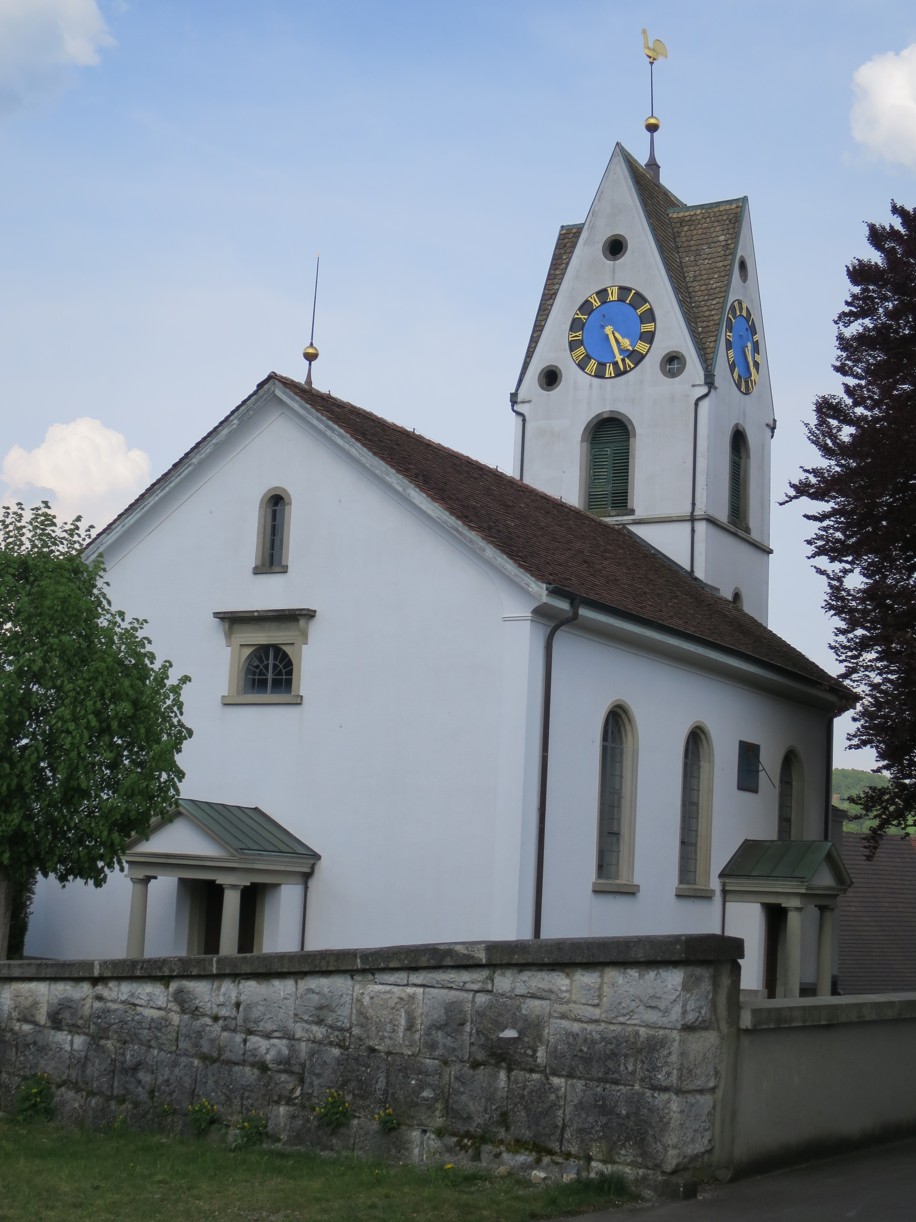 Ansicht der reformierten Kirche